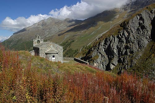 Kapelle St. Jean unterhalb der Staumauer Grande Dixence